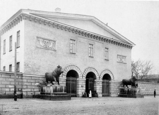 Cкотопригонный двор. Фото 1900-х гг.